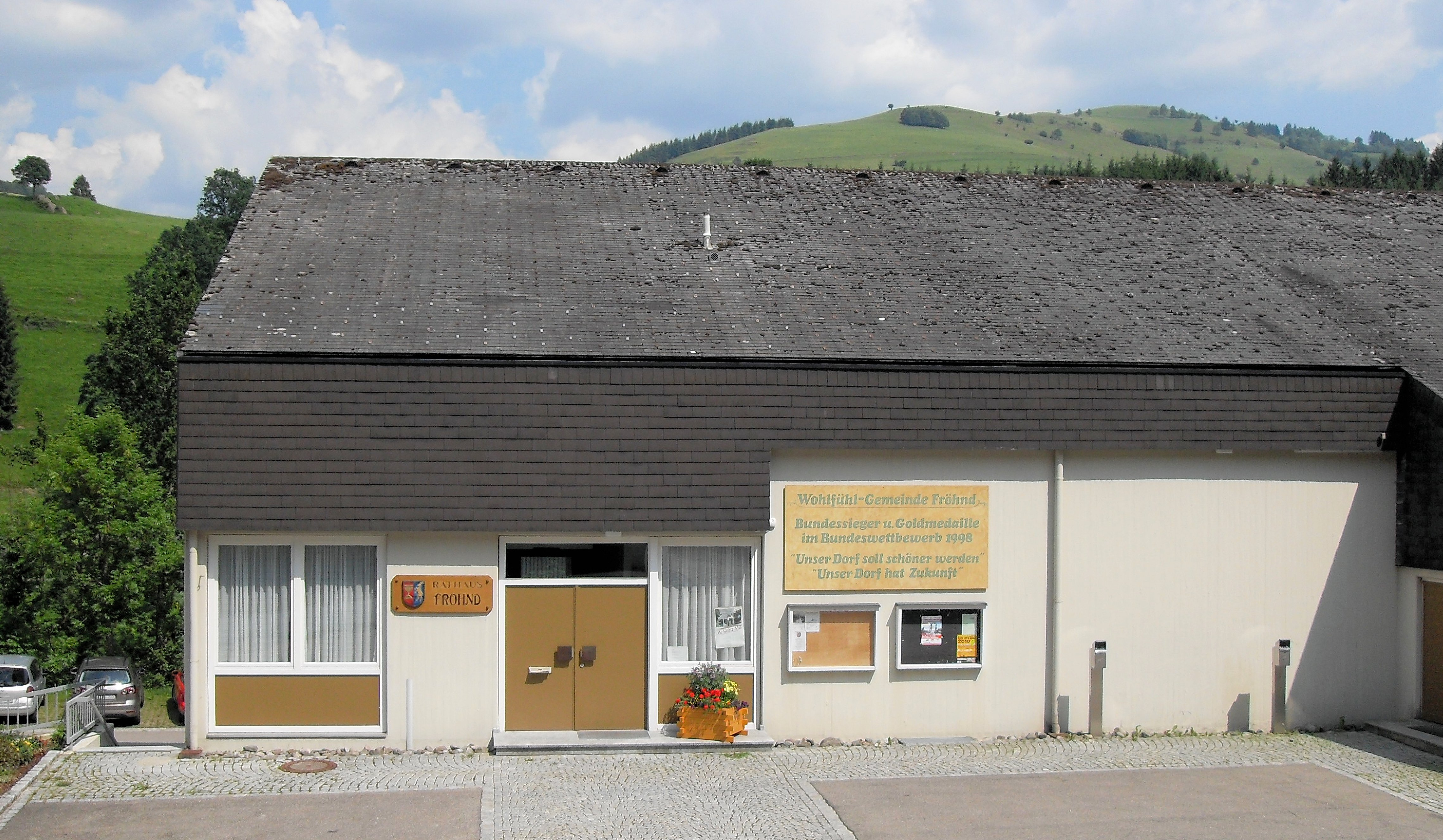 Rathaus im Ortsteil Unterkastel der Gemeinde Fröhnd, Schwarzwald, Deutschland